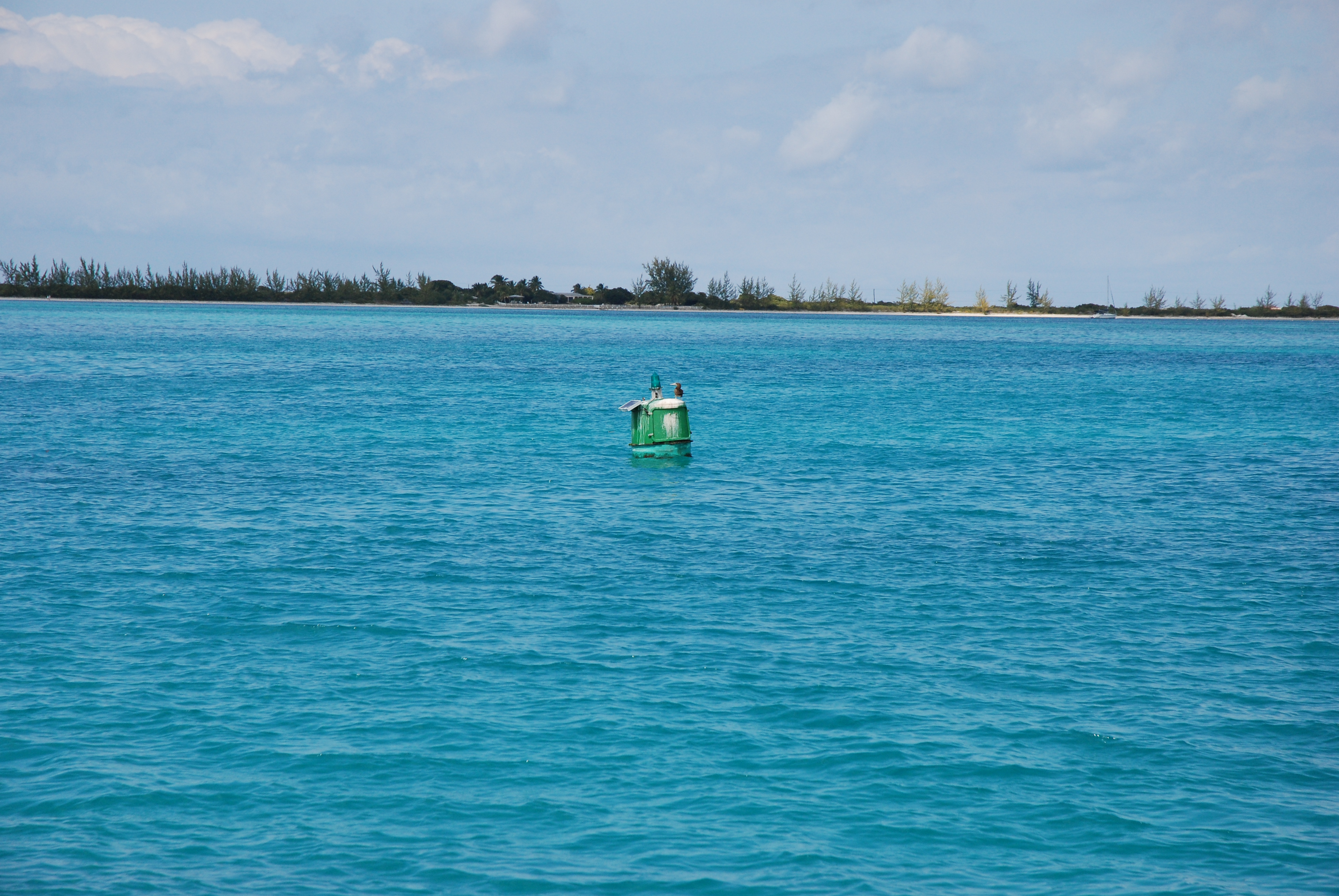 anegada